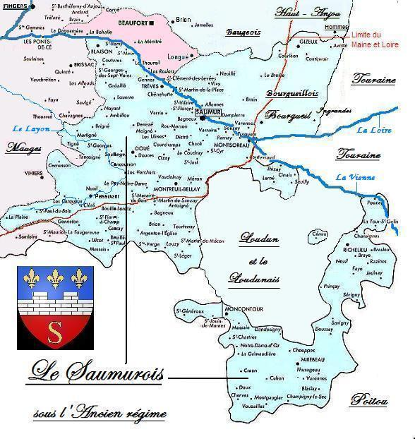 Travail personnel de recoupement à partir de documents.